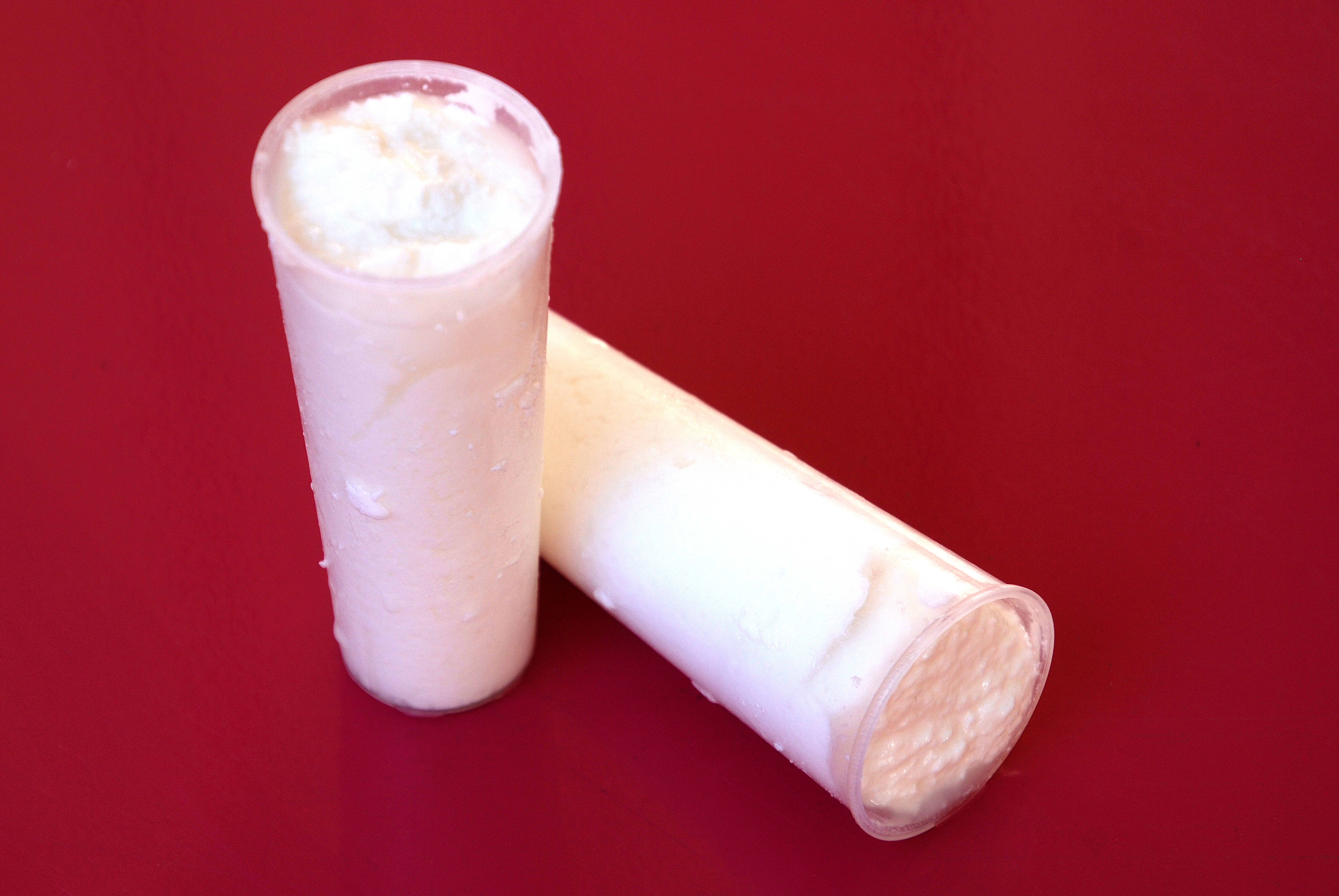 Ziegenfrischkäse "Brousse du Rove" in typischem Becher